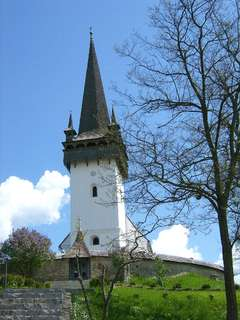 Körösfő református temploma